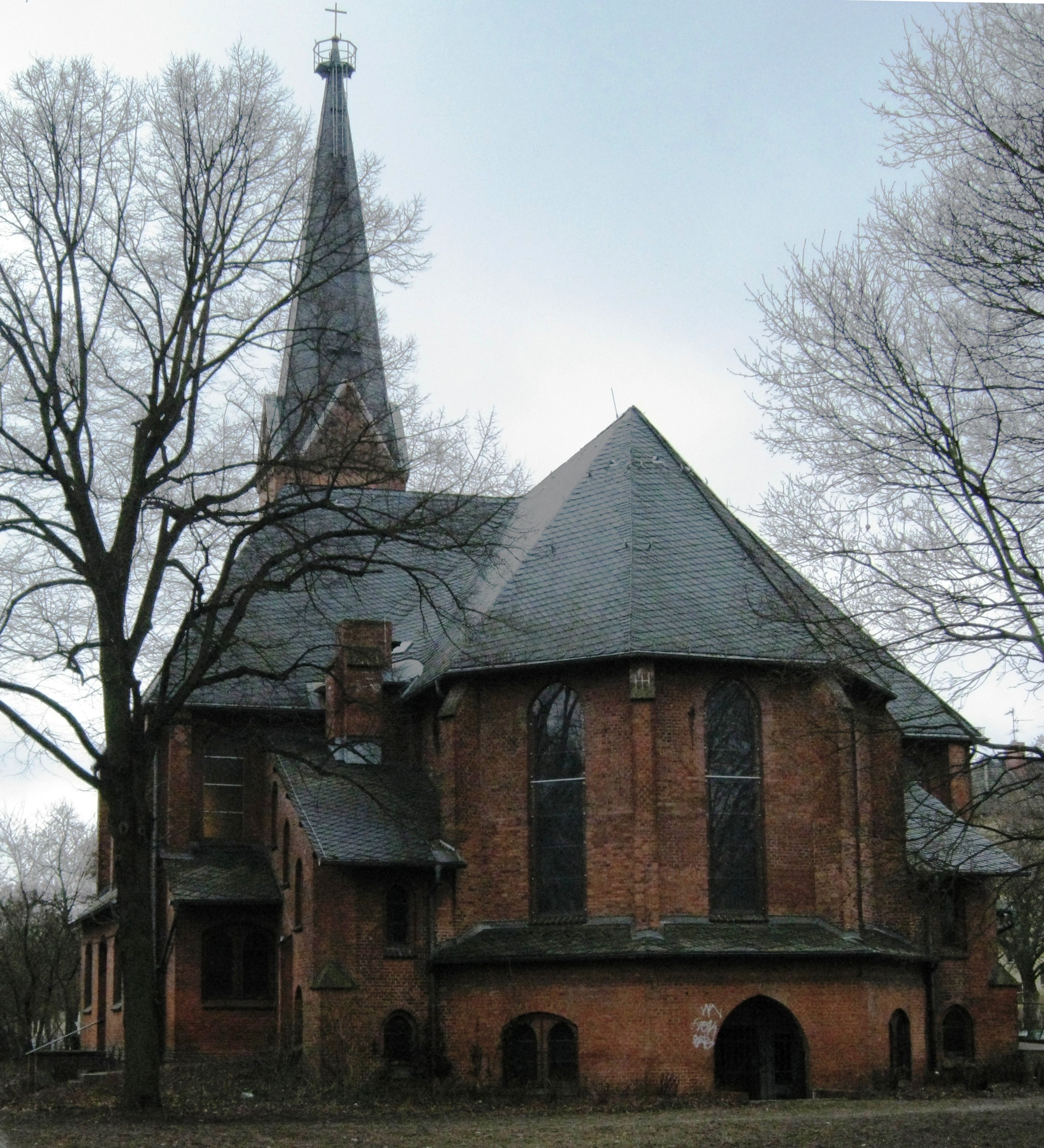 Rückseite (fotografiert nach Süden) der Segenskirche in Berlin-Reinickendorf